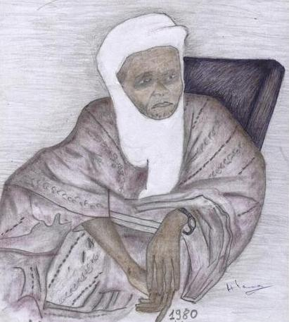 Habillement des aristocrates Zarma. Le grand boubou est appelé Diabé, le pontalon (Mudune), le Litham (Bontobay). Auteur: Utilisateur:Taway